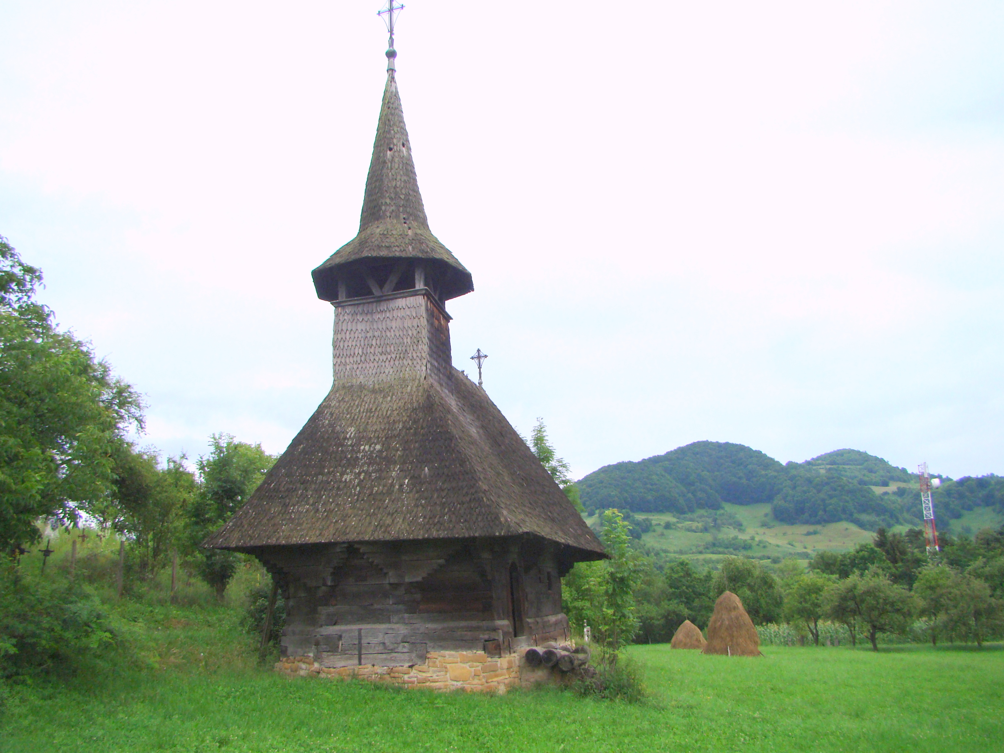 Biserica de lemn din Zagra